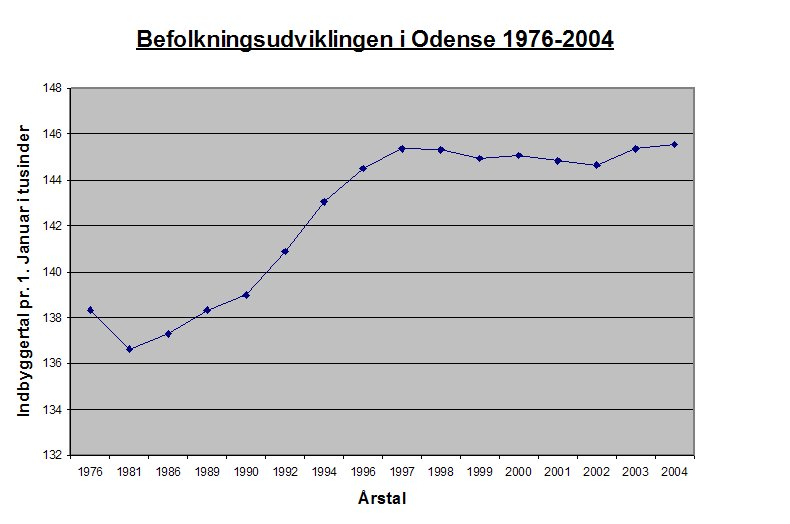 Befolkningsudviklingen i Odense 1976-2004. Tallene stammer fra Danmarks Statistik